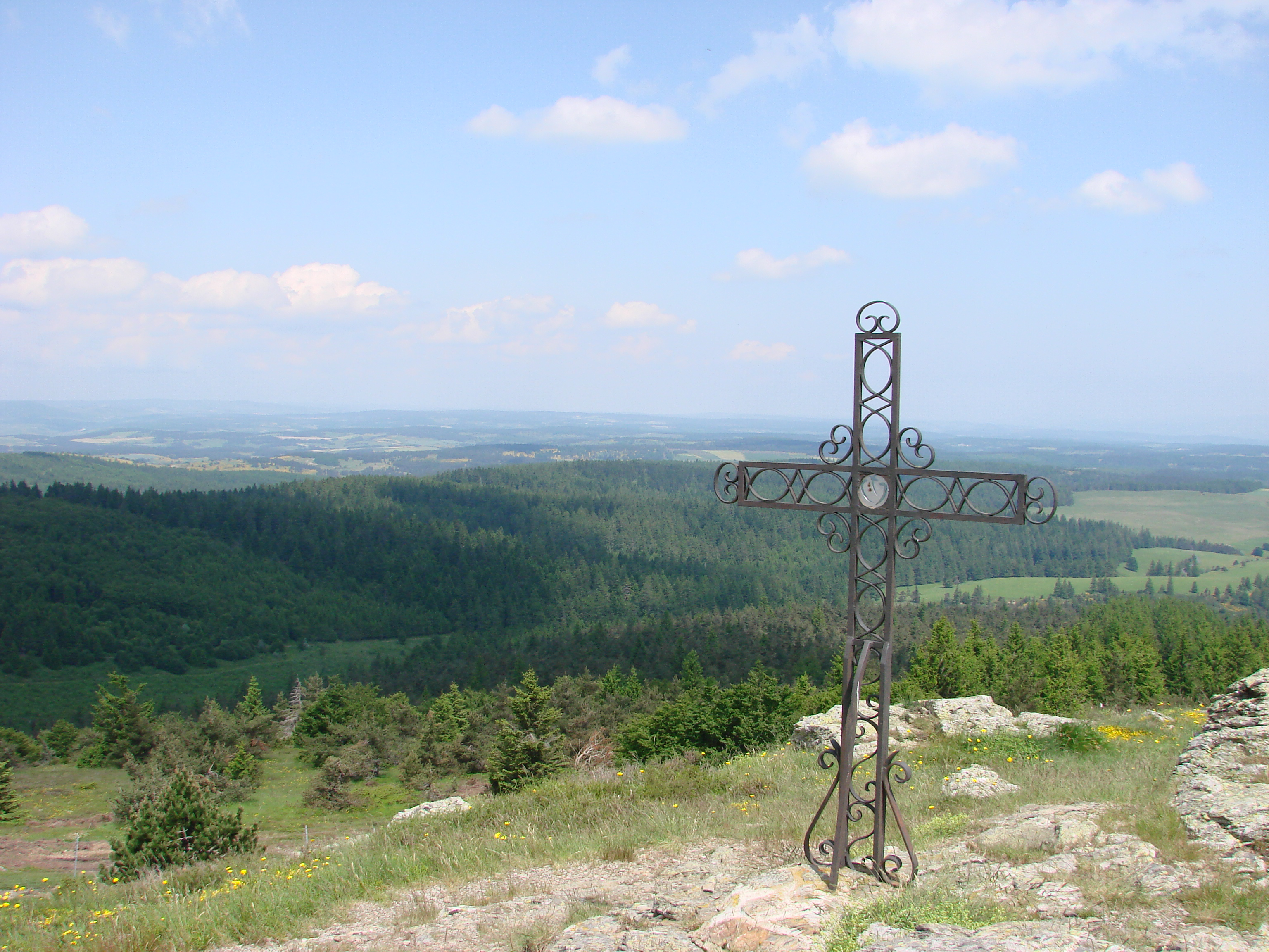 Sommet du Moure de la Gardille